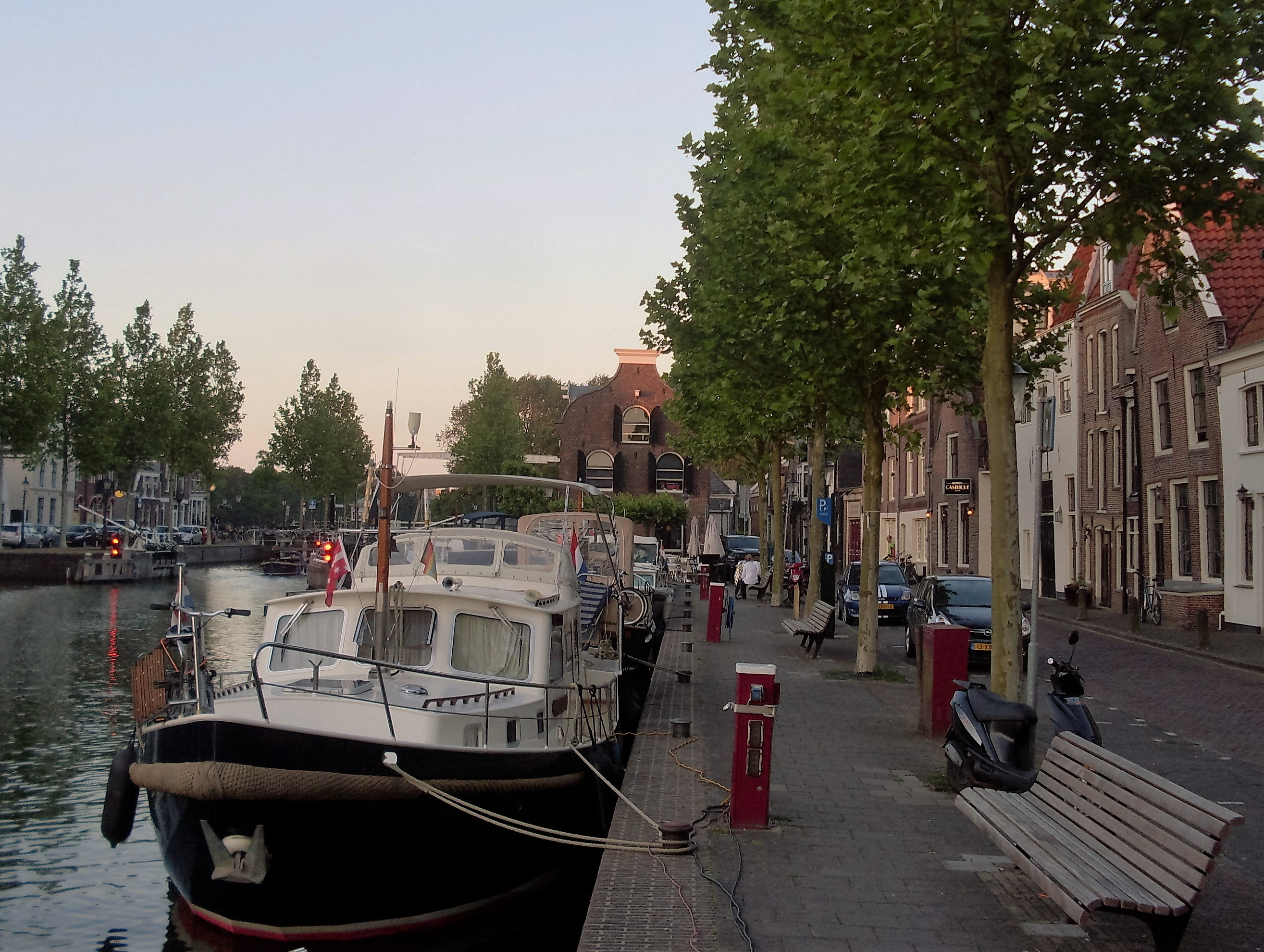 Langs de Vecht